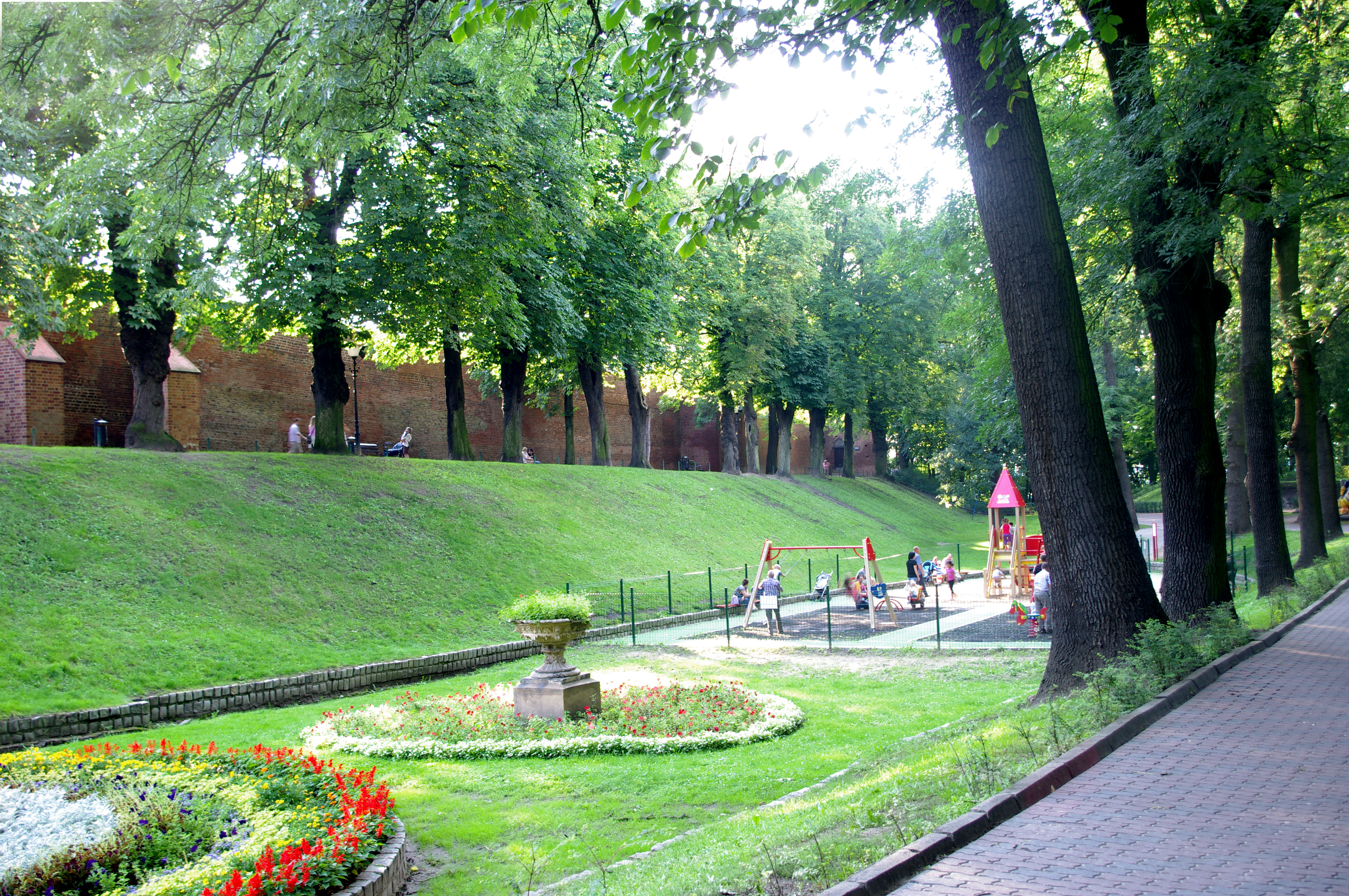 Chełmno, zespół murów miejskich